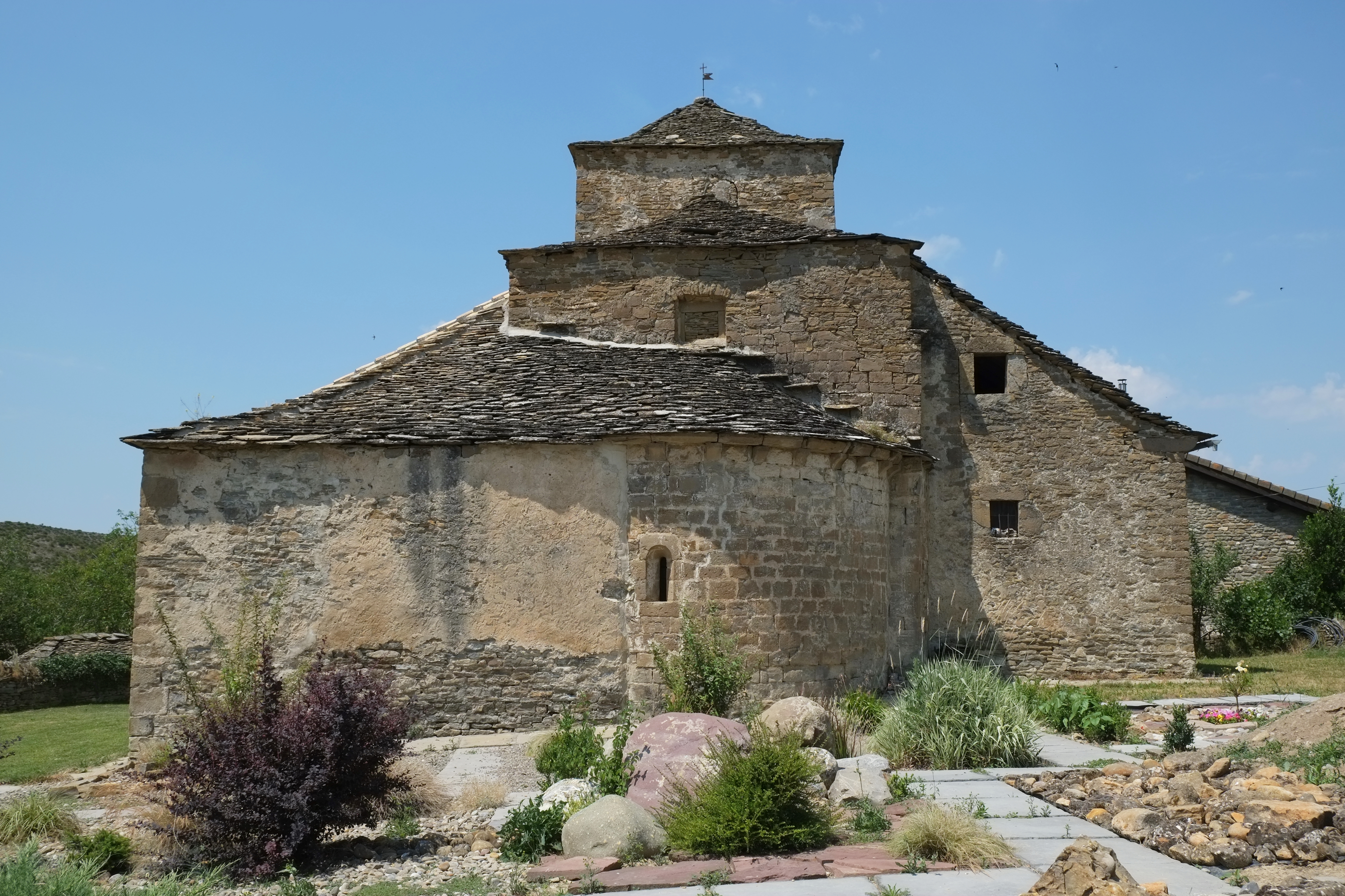 Kirche Santa María in Sardas in der Provinz Huesca in der Region Aragonien (Spanien)